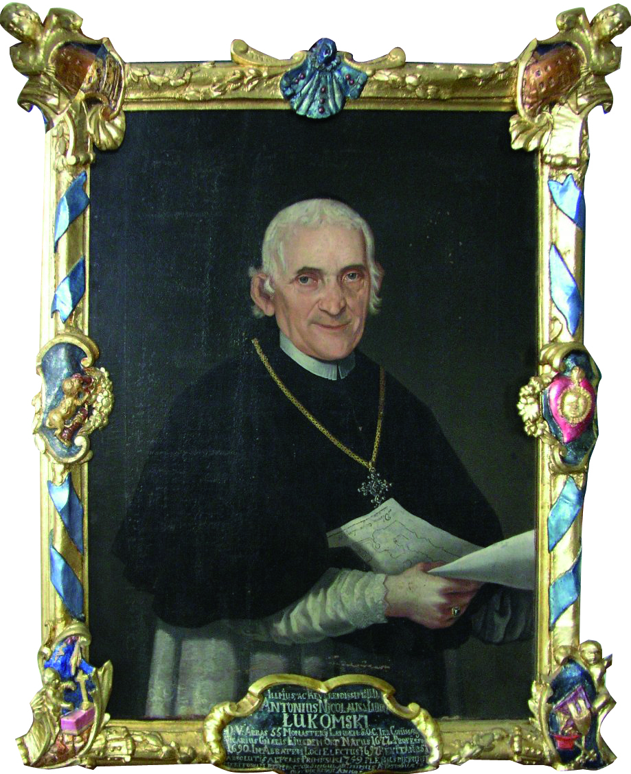 Opat Lądu Mikołaj Antoni Łukomski, portret autorstwa Józefa Rajeckiego, olej na płótnie 1747 r. Opat trzyma w dłoni plan zachodniej partii kościoła w Lądzie autorstwa Pompea Ferrariego. Więcej o portrecie: J. Nowiński, Portret opata-mecenasa Mikołaja Antoniego Łukomskiego, pędzla Józefa Rajeckiego, i rama jemu dedykowana, w: Architektura znaczeń. Studia ofiarowane prof. Zbigniewowi Bani w 65. rocznicę urodzin i 40-lecie pracy dydaktycznej, red. A. S. Czyż, J. Nowiński, M. Wiraszka, Warszawa 2011, s. 318-337.